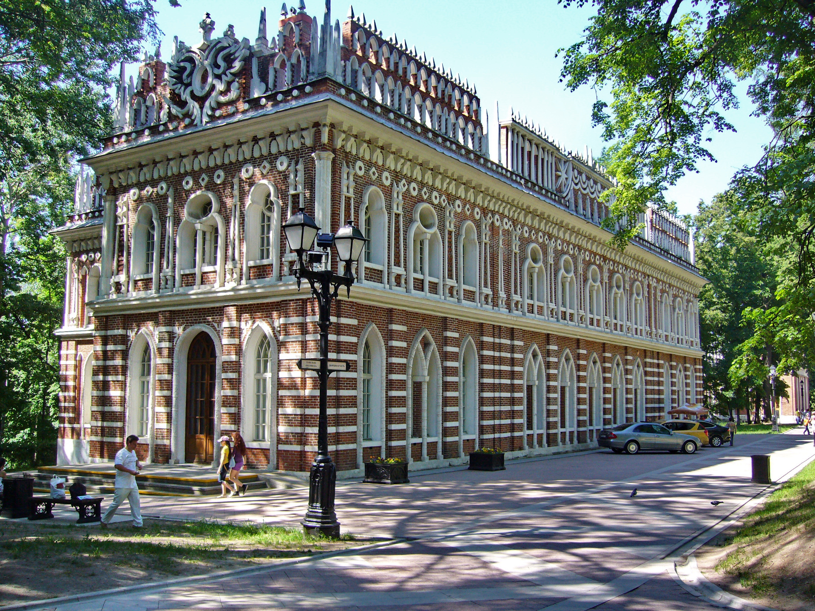 Царицыно